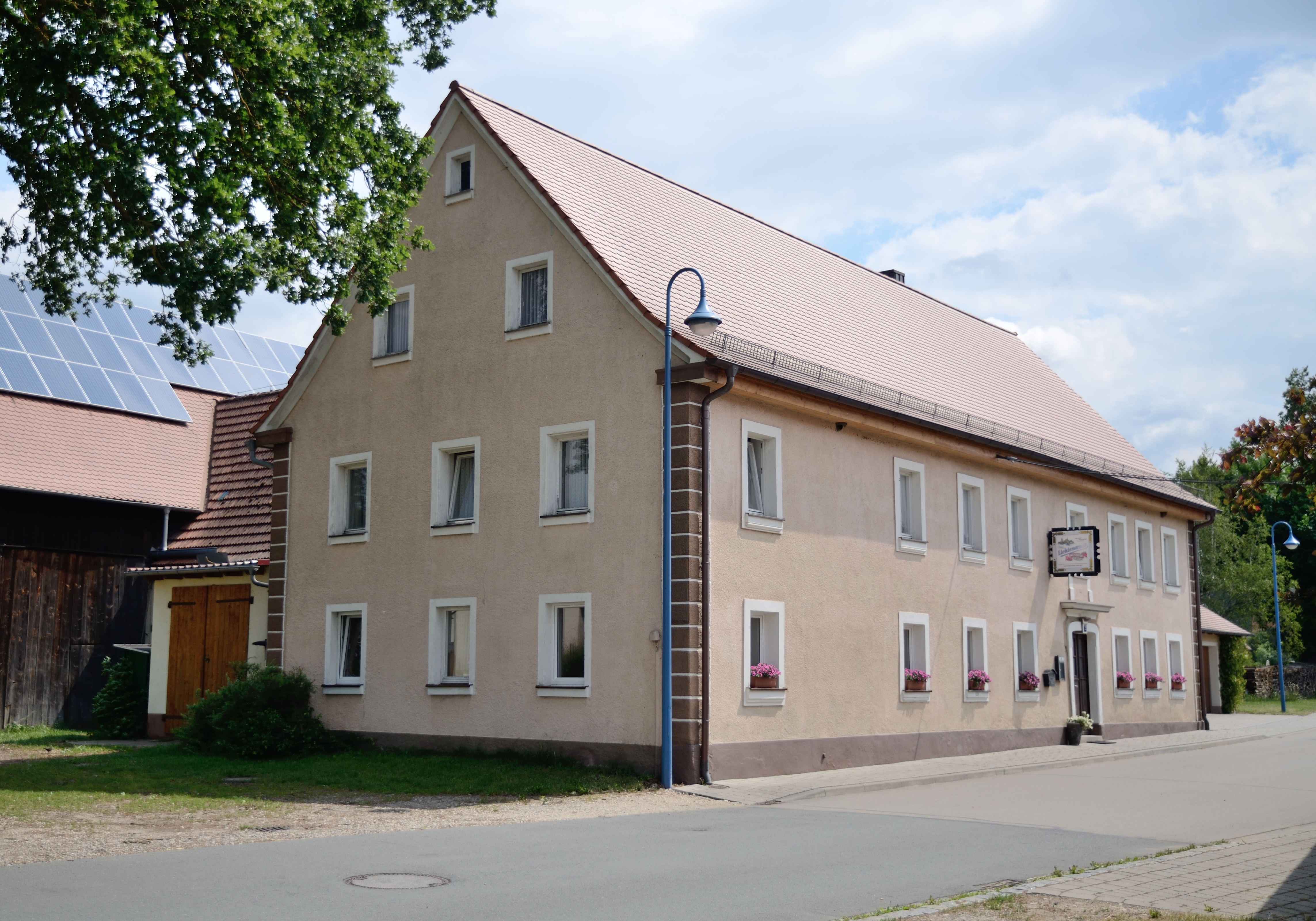 Haus Nr. 2 in Schlauersbach: Gasthaus, zweigeschossiger Satteldachbau, mit Ecklisenen, Ende 18. Jahrhundert, im 19. Jahrhundert verändert